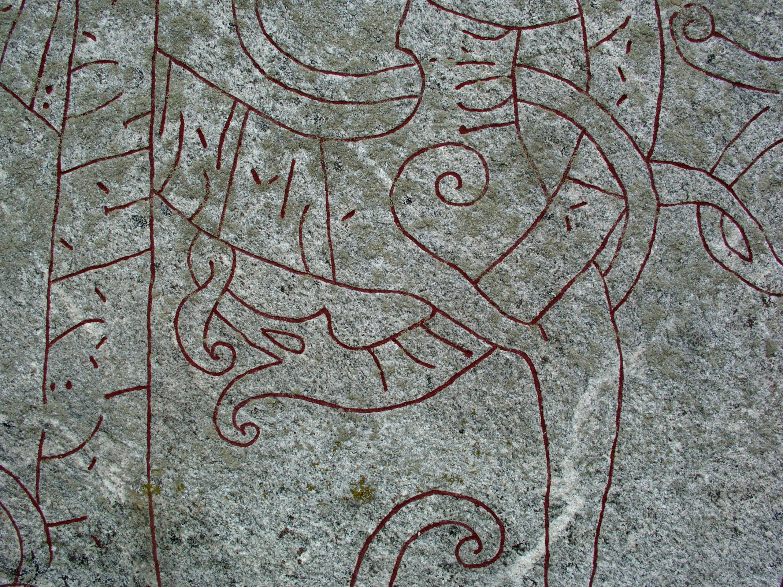 Hälsingtuna church, Runestone, Hudiksvalls kommun.